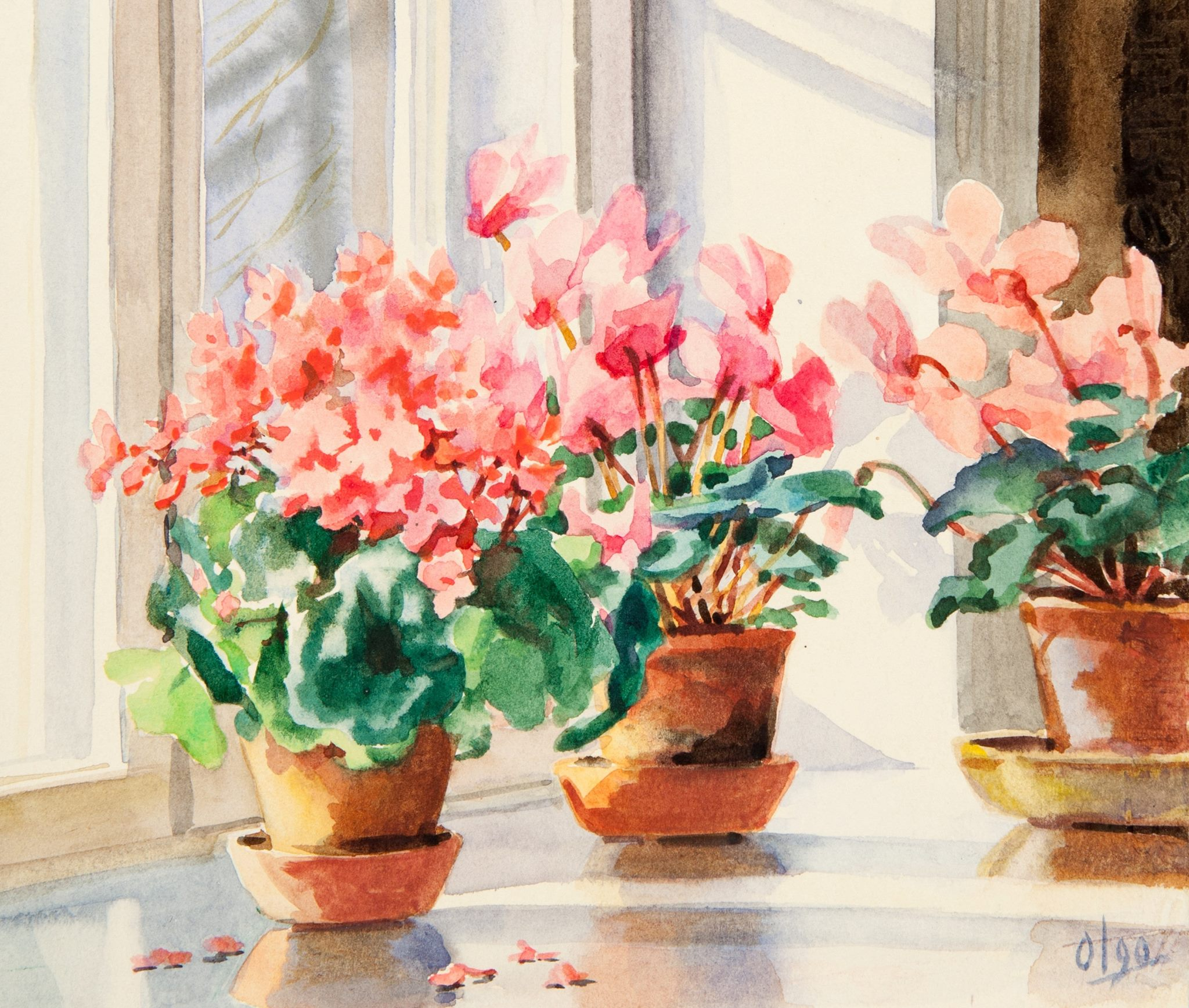 Великая княгиня с детства увлекалась рисованием, и не оставляла свою страсть до конца жизни. В молодые годы она брала уроки у известных мастеров – К.В. Лемоха, В.Е. Маковского, С.Ю. Жуковского и С.А. Виноградова. Августейшая художница предпочитала рисунки акварелью, оставив после себя значительное графическое наследие. В музейных собраниях рисунки Ольги Александровны очень редки. Представленный рисунок – единственная работа великой княгини в Историческом музее – имеет автограф «Olga».